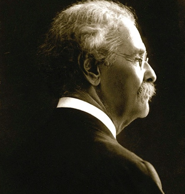 Benedito Calixto. Foto no acervo da Fundação Pinacoteca Benedicto Calixto - Santos, SP, Brasil.